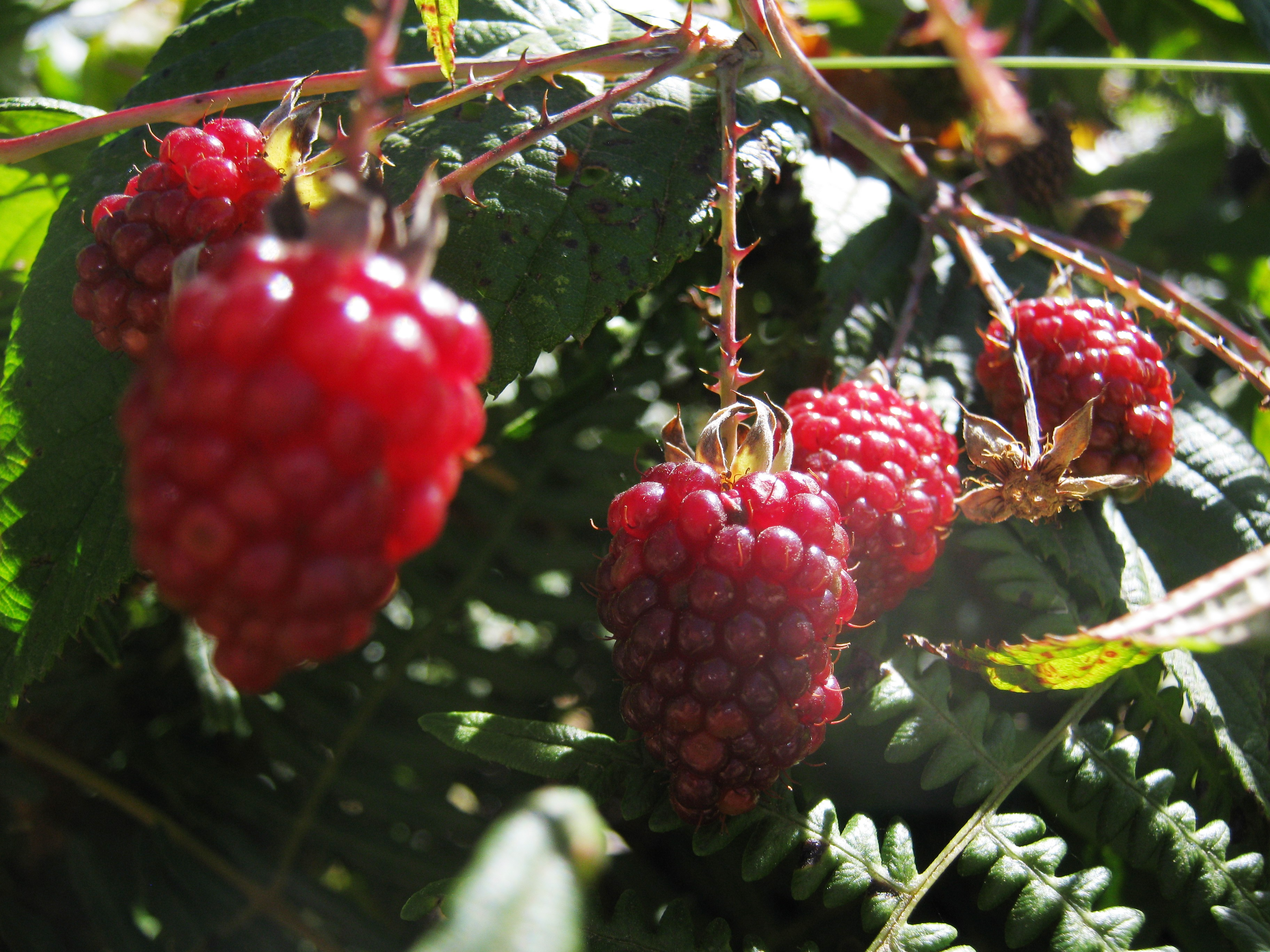 Fotos tomadas en trinidad, Dota